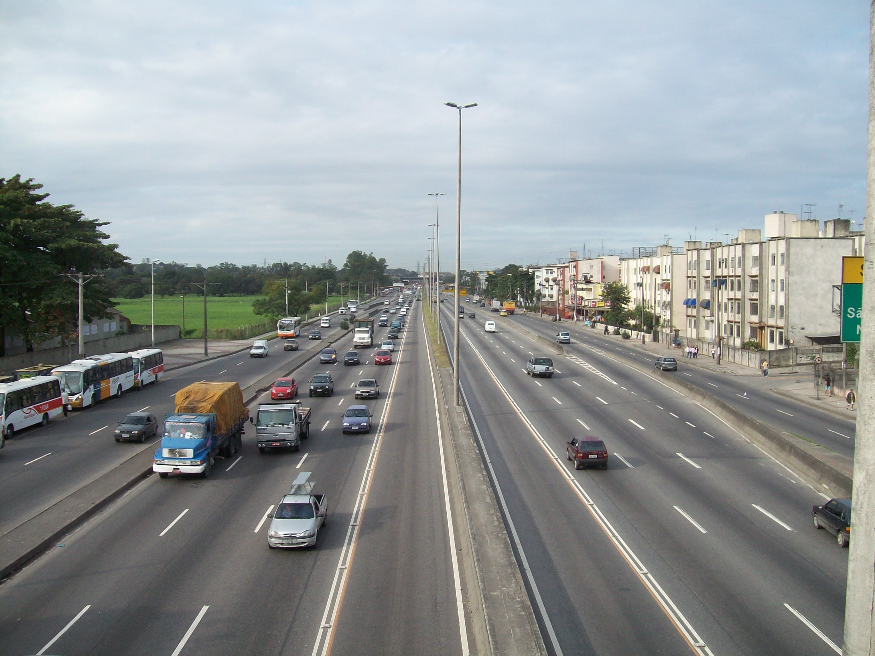 Aerial view of Avenida Brasil in Rio de Janeiro, RJ, Brazil.